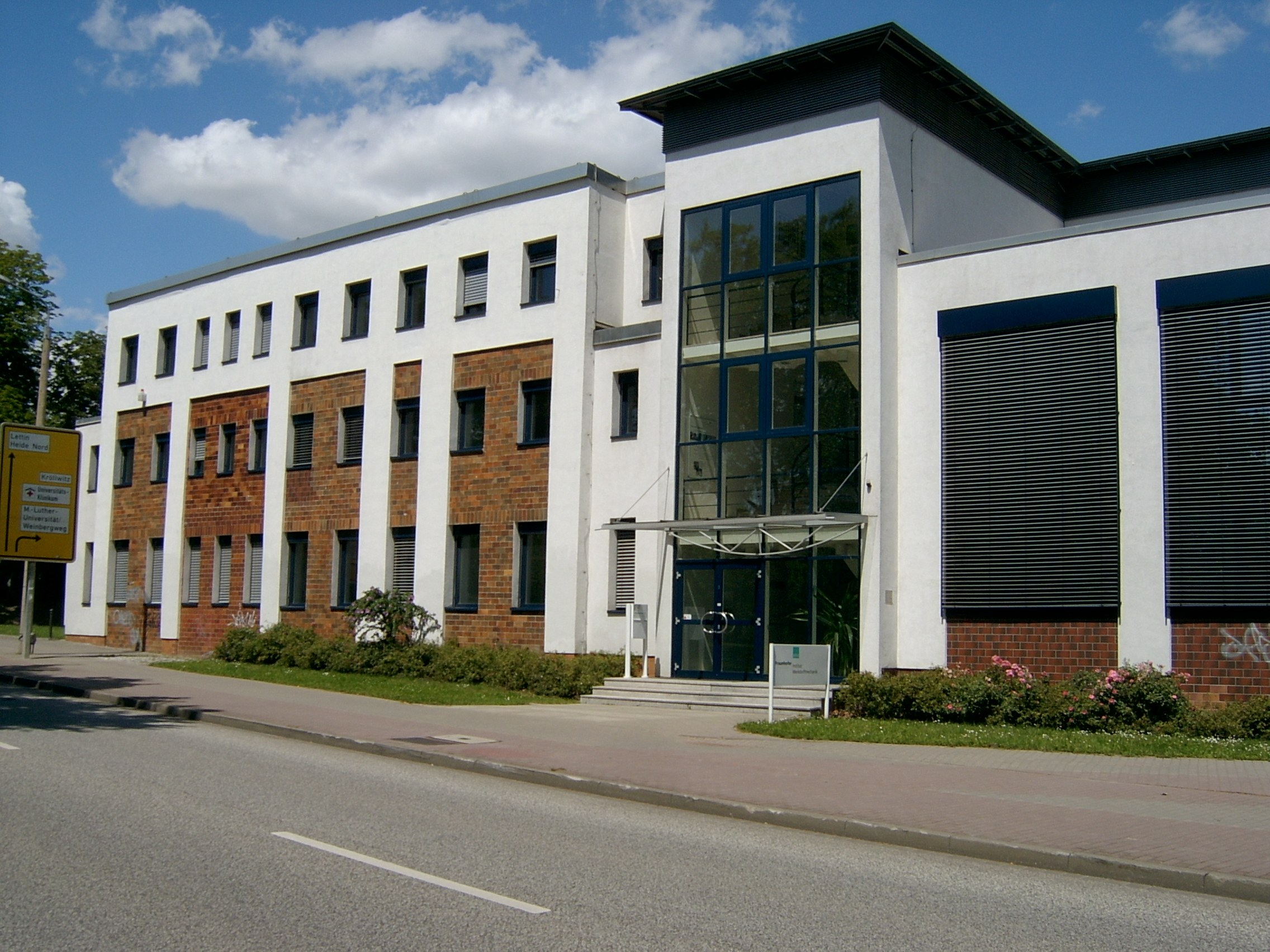 Fraunhofer Institut für Werkstoffmechanik in Halle (Saale), Weinberg Campus